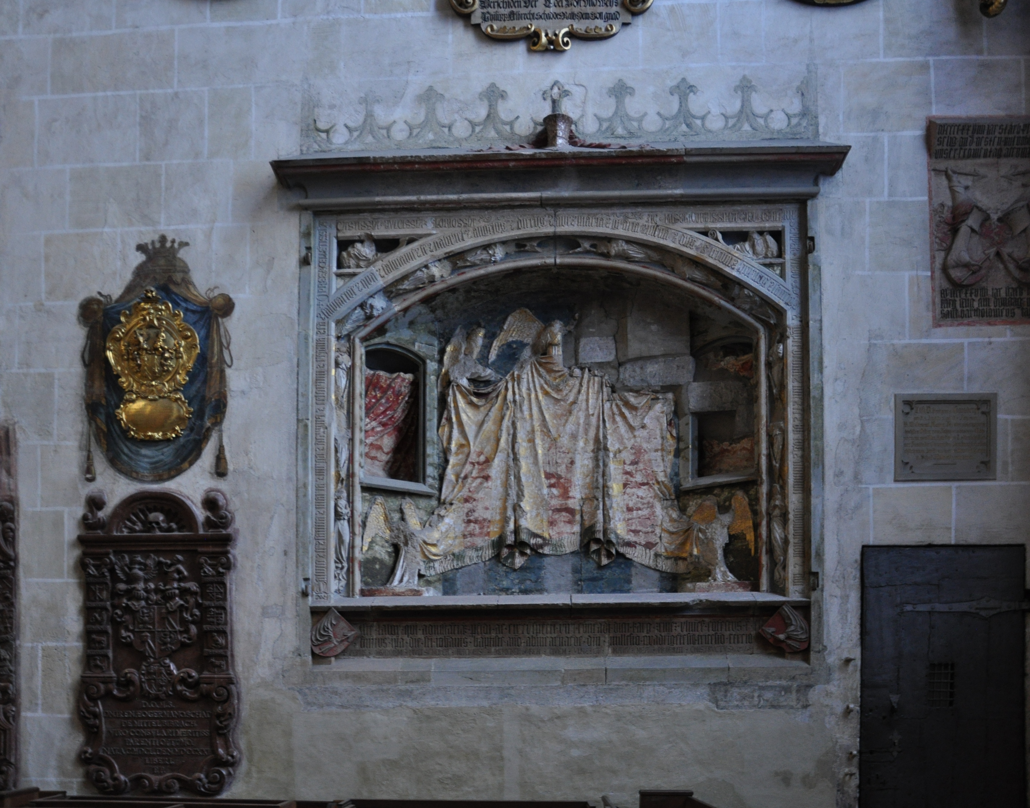 Ulm, Ulmer Münster, „Karg-Nische“ (ehemaliger Altar der Familie Karg)